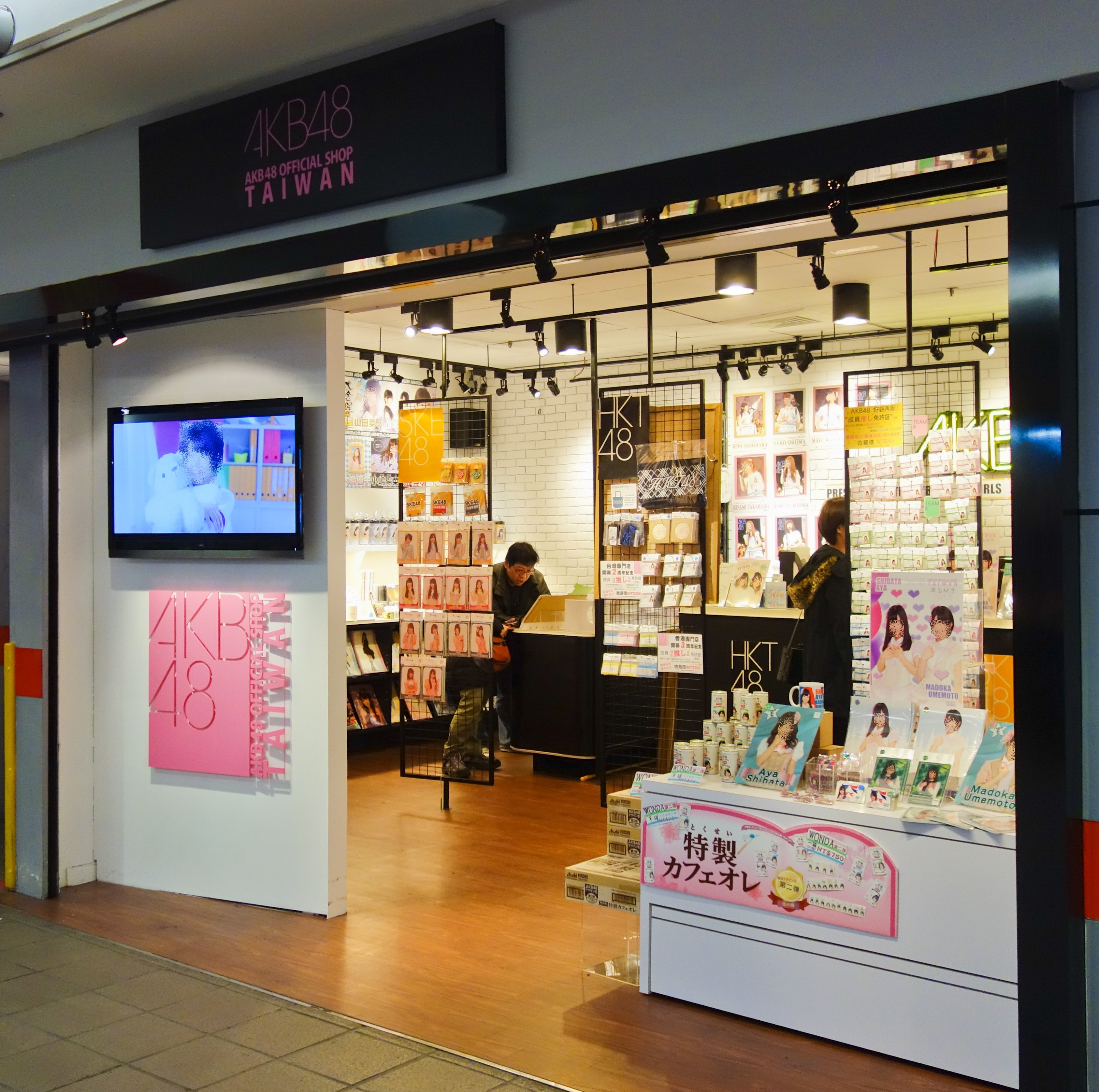 中文（台灣）: AKB48台灣官方商店，位於臺北市中山地下街A34號。